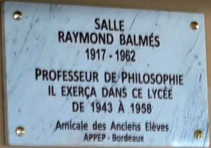 Plaque en mémoire de Raymond Balmès offerte par l'amicale des anciens élèves du Lycée Bertran de Born (Périgueux) et par l'Appep-Bordeaux